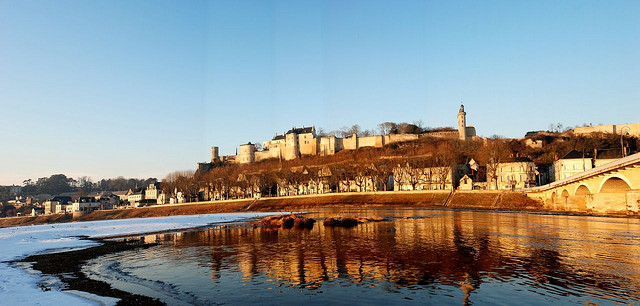 Chateau - Forteresse Chinon- Val de Loire - B&B Loire Valley (4)